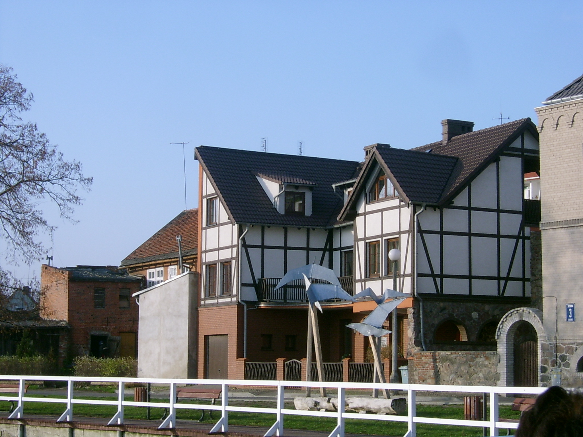 Barlinek - szachulcowy dom nad jeziorem